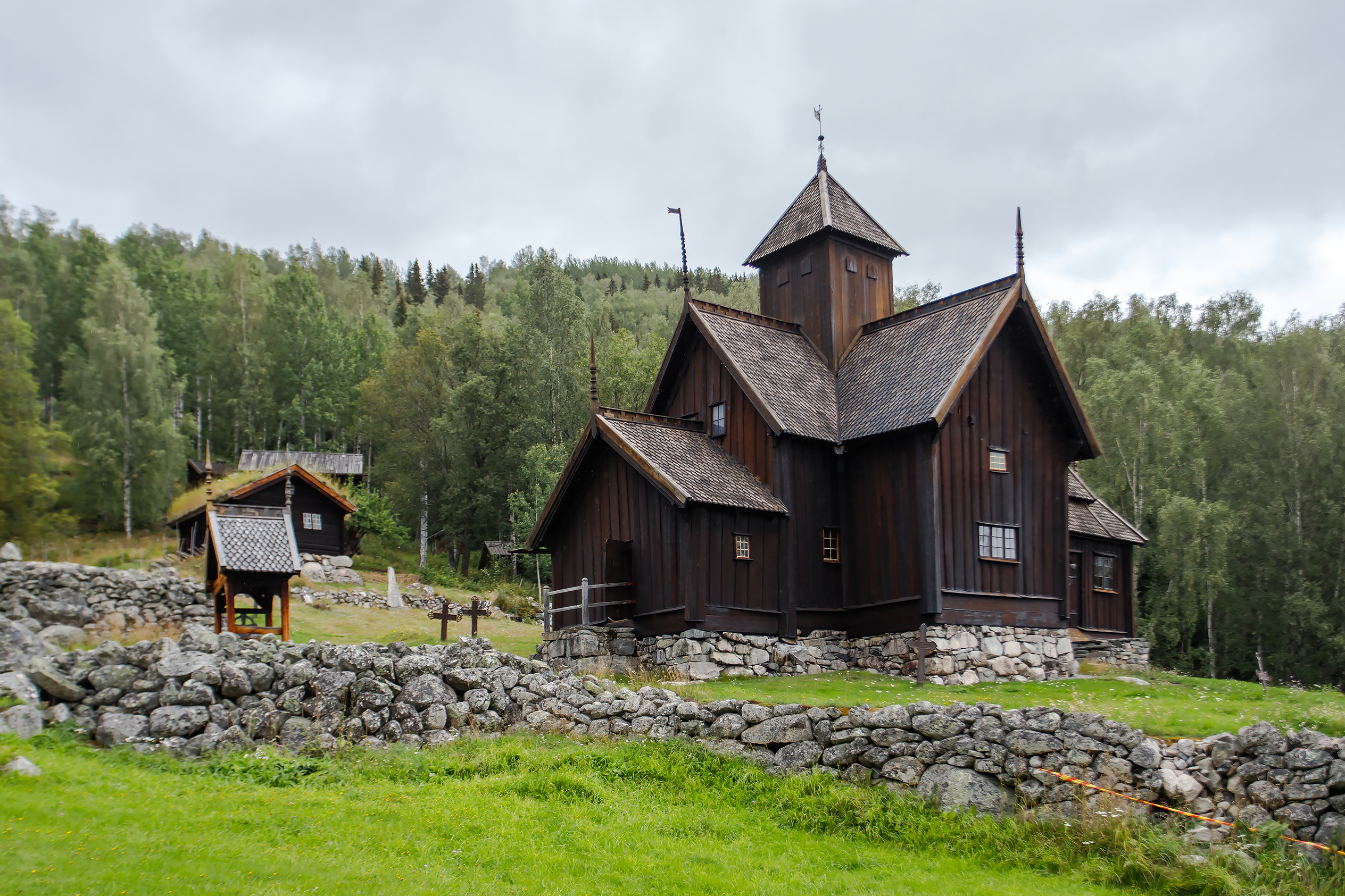 Ставкирка в Увдале